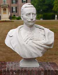 voorbeeld van buste (van keizer Wilhelm II te Doorn) (foto gemaakt door Wouter Hagens)